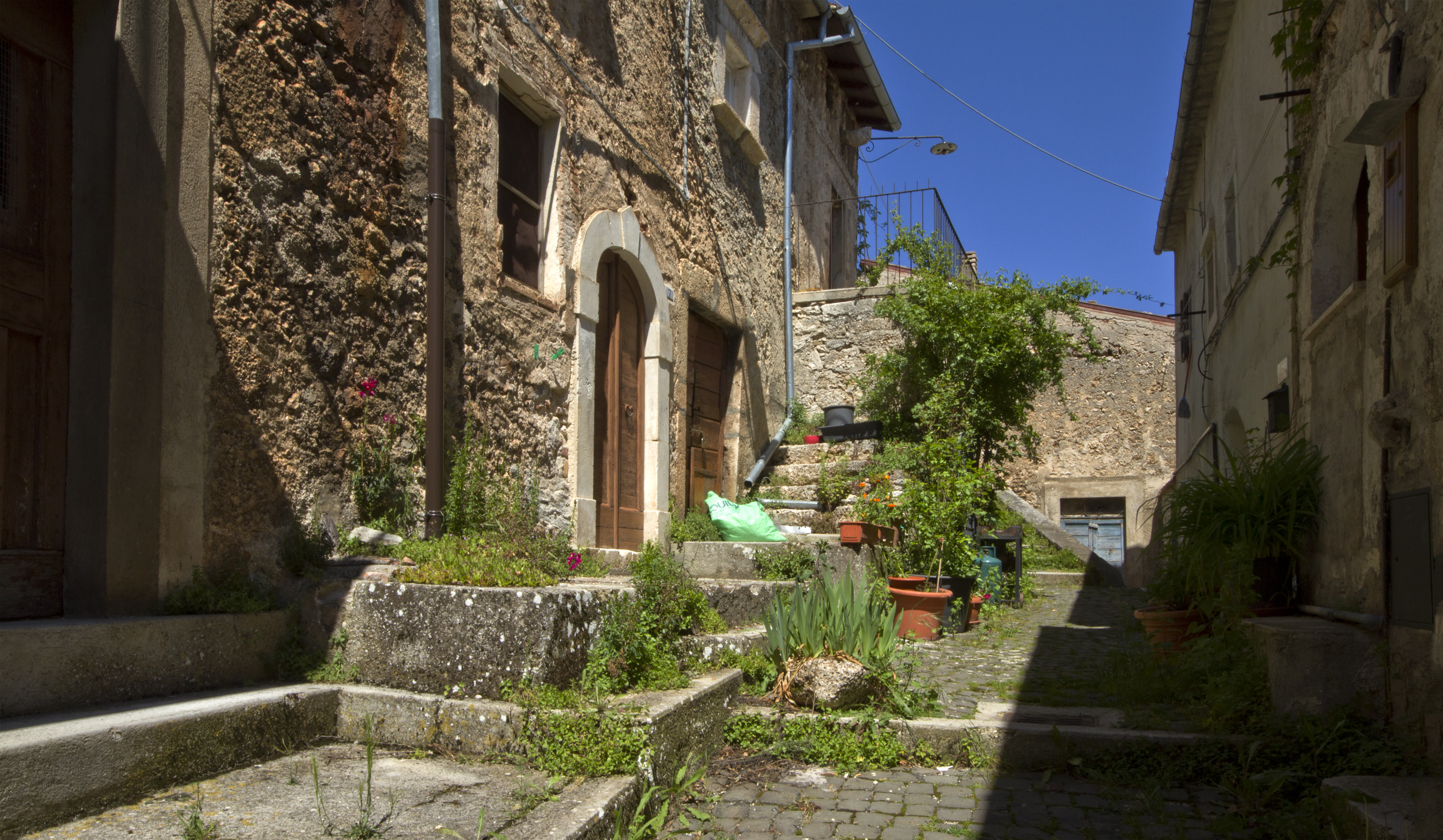 67020 Calascio AQ, Italy